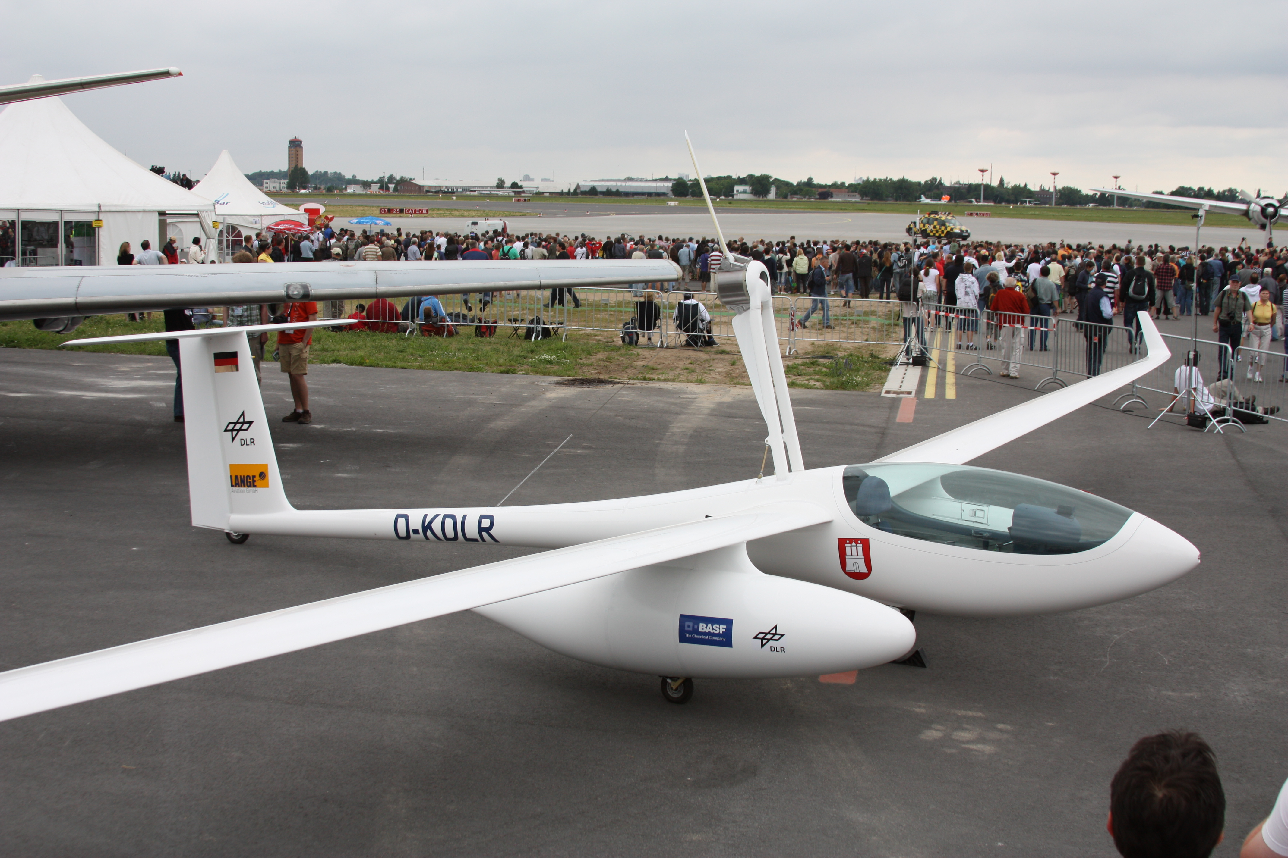 ILA 2010, am Samstag aufgenommen, meist erhöht von einer Leiter fotografiert